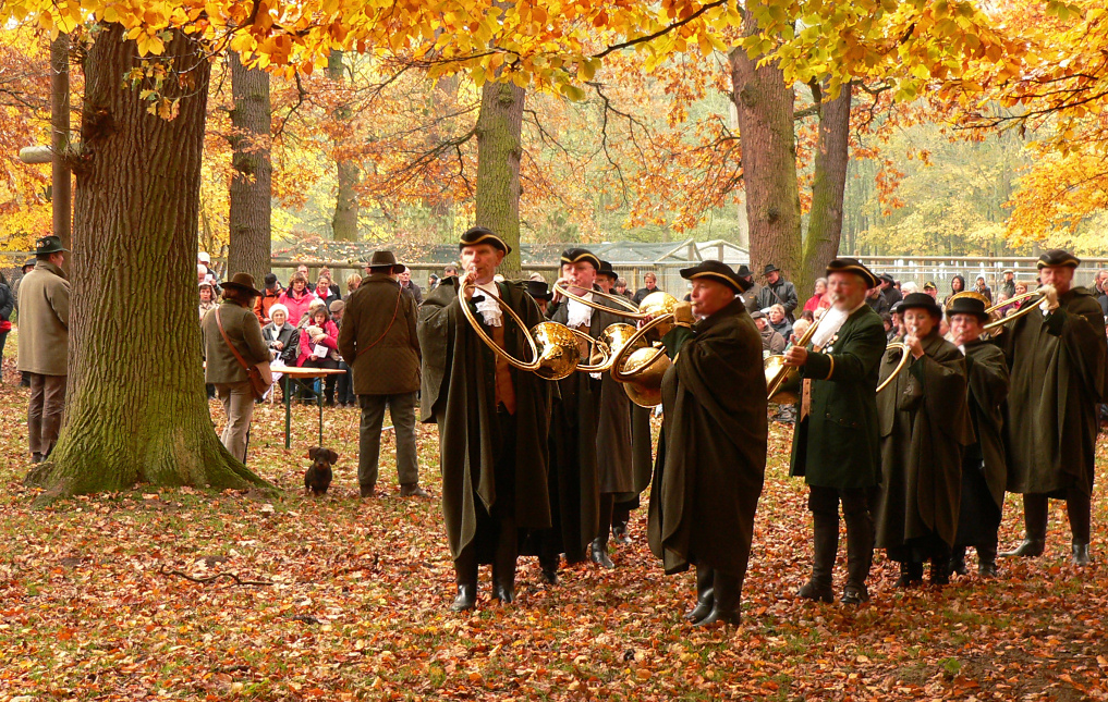 Parforcehornbläser Hannover "Treffpunkt Fermate"